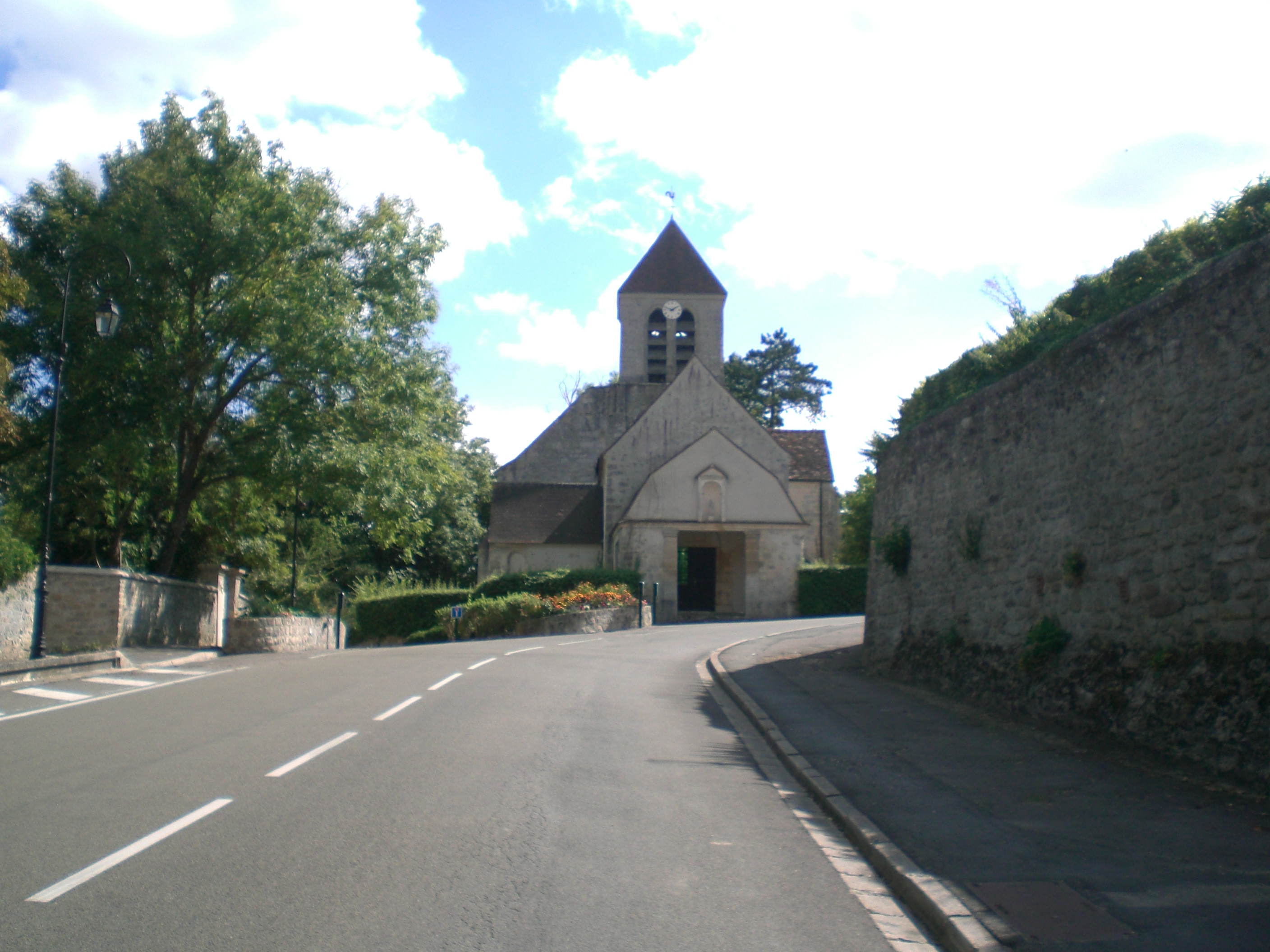 église d'ableiges